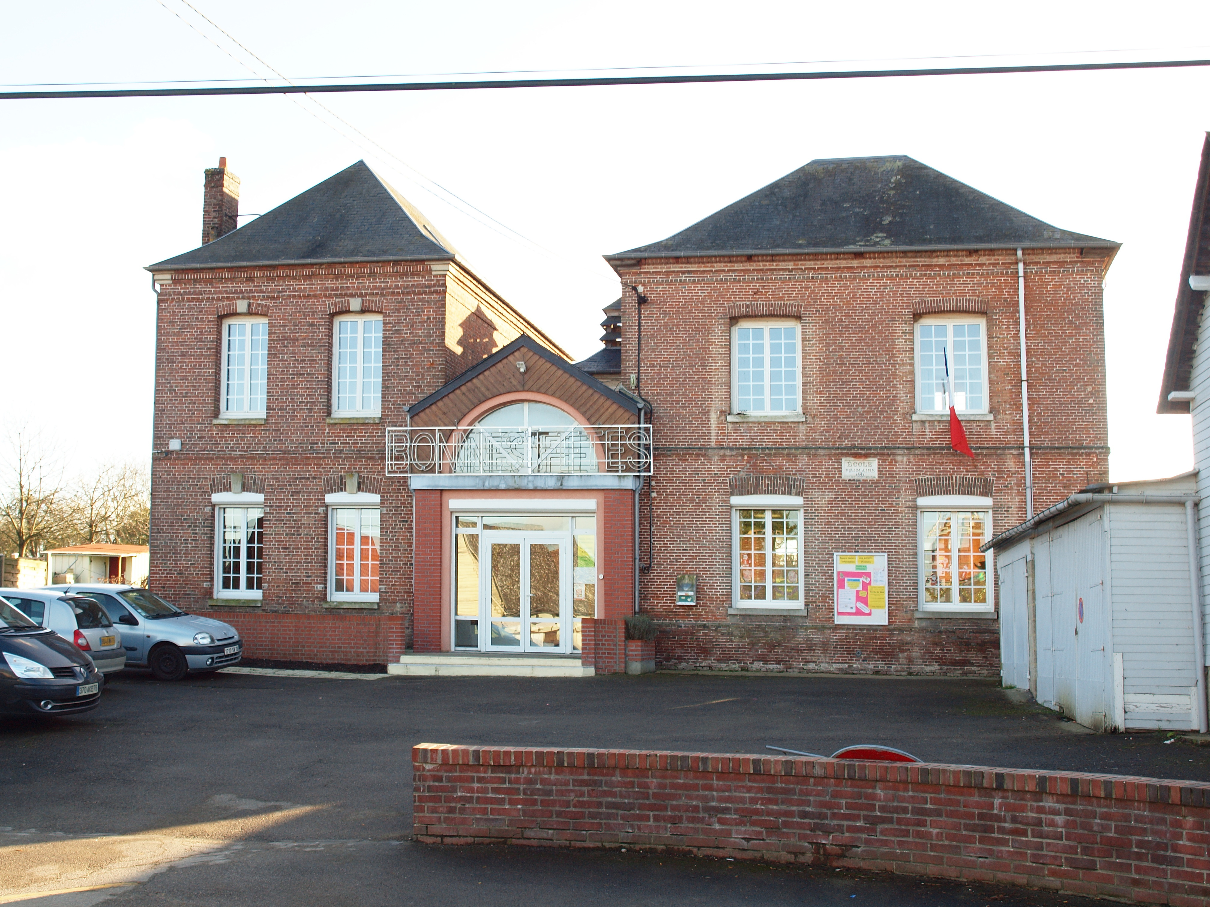 Hodeng-au-Bosc (Seine-Maritime, France)